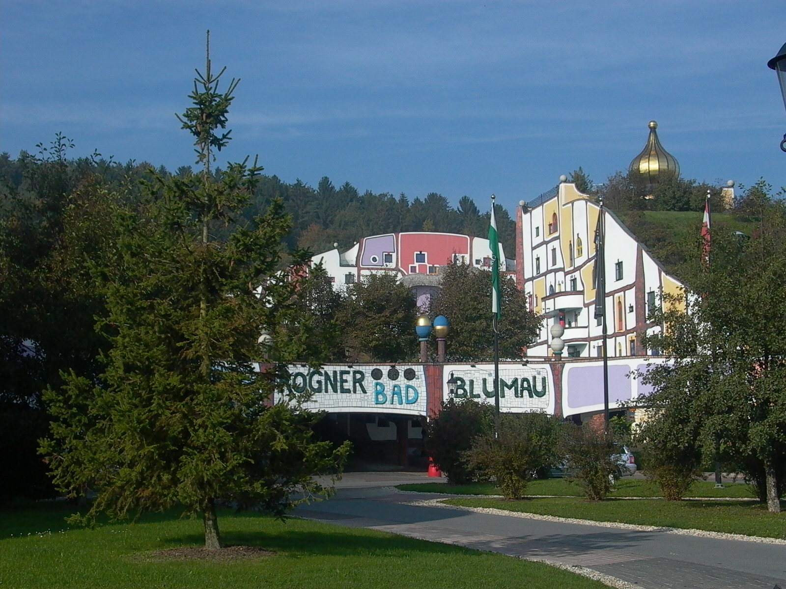 Von Friedensreich Hundertwasser gestaltete Therme in Blumau, Steiermark